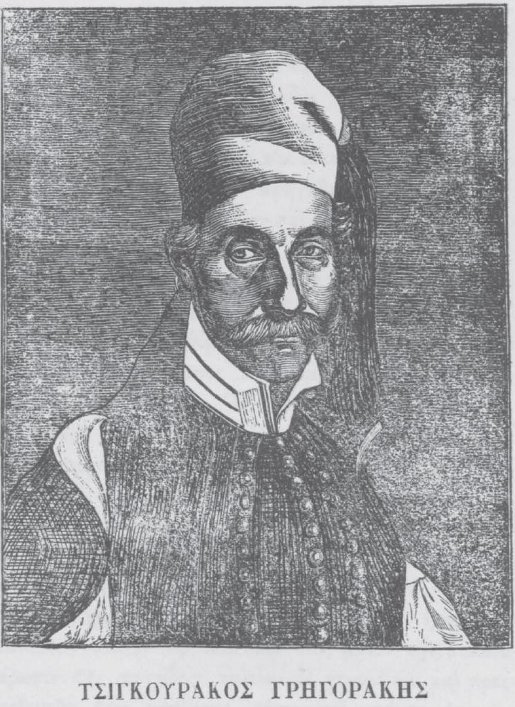 Griechischer Gelehrter, 19. Jahrhundert